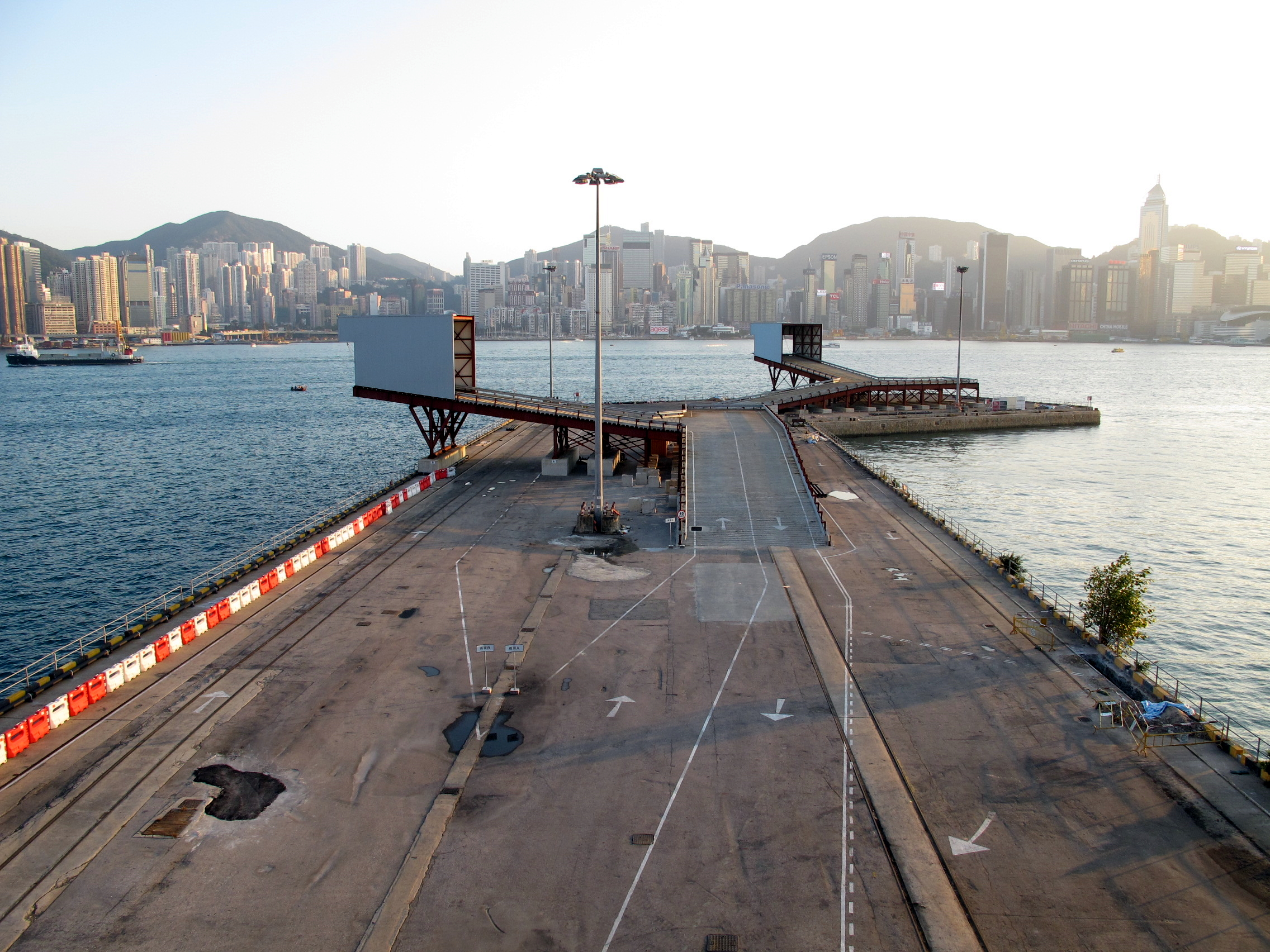 Hung Hom Seaside pier